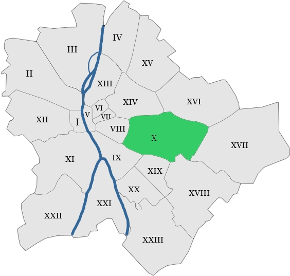 map hungary budapest district 2